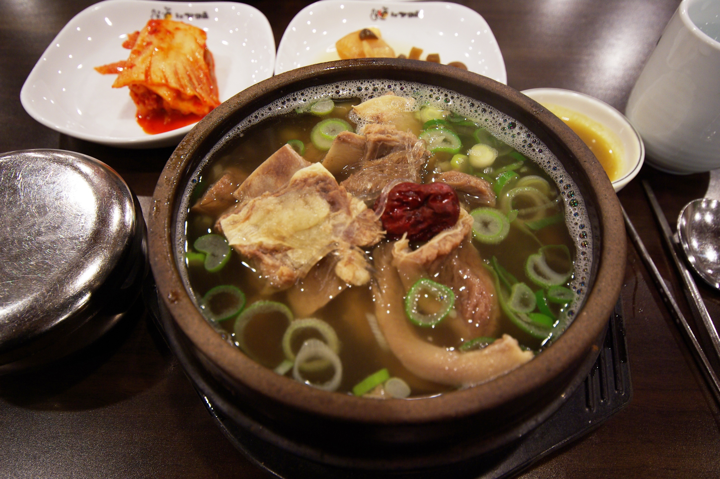 갈비를 넣고 고아 우려낸 국물로 만들어진 갈비탕입니다.